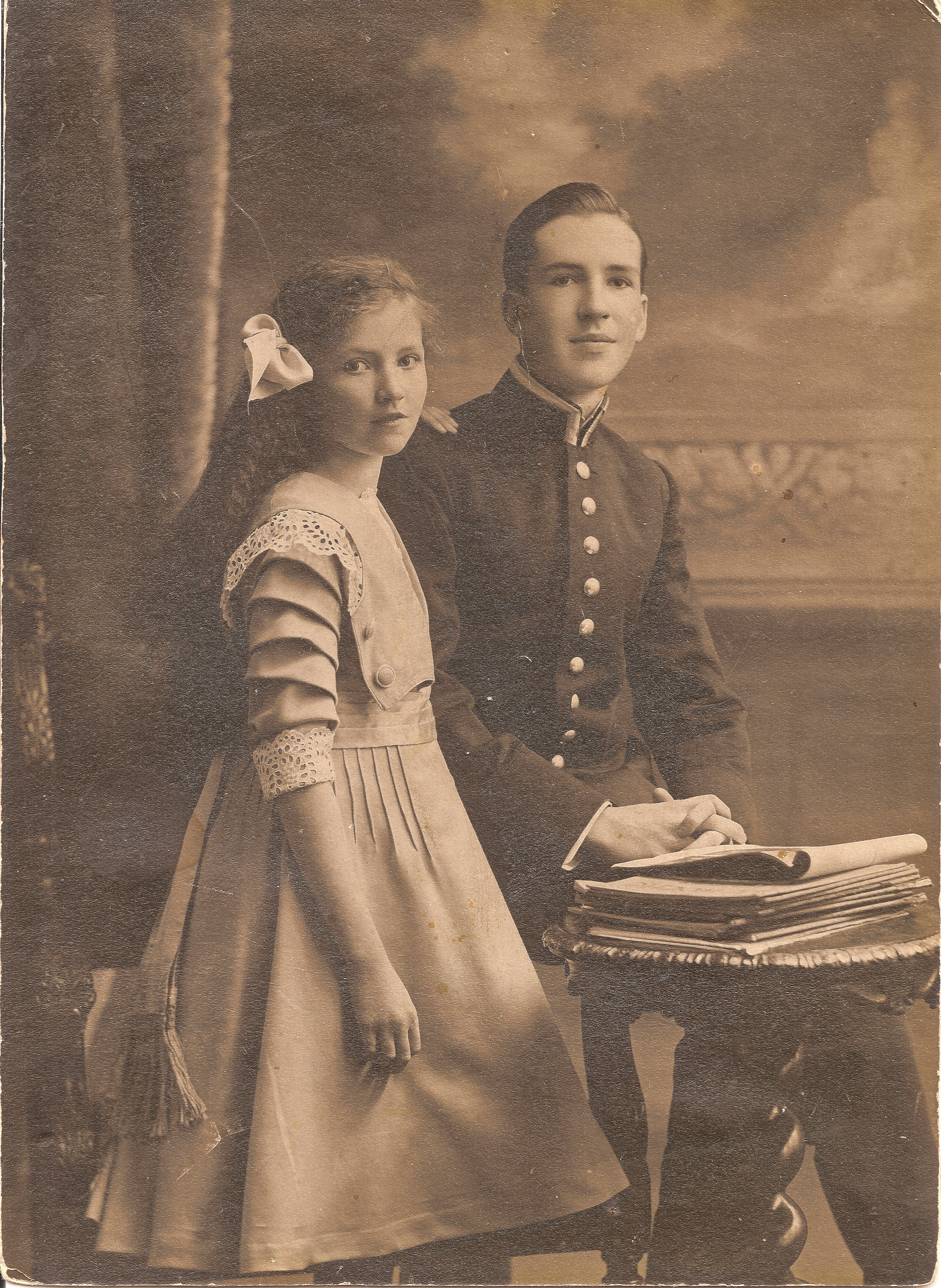 Борис Борисович и Александра Борисовна Бер. 1910 г